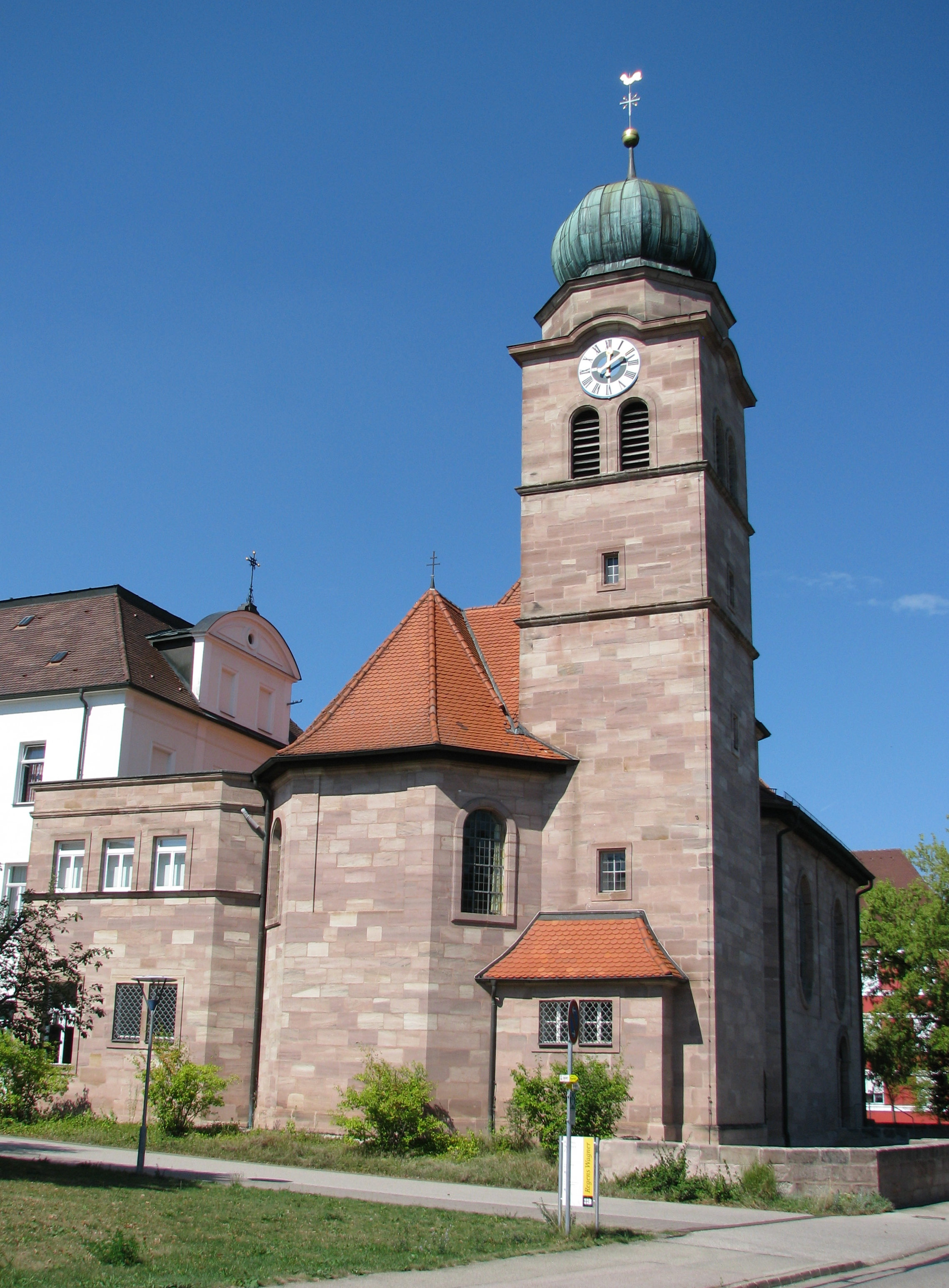 Zell, Ortsteil von Hilpoltsteim im Landkreis Roth, Kath. Pfarrkirche St. Walburga